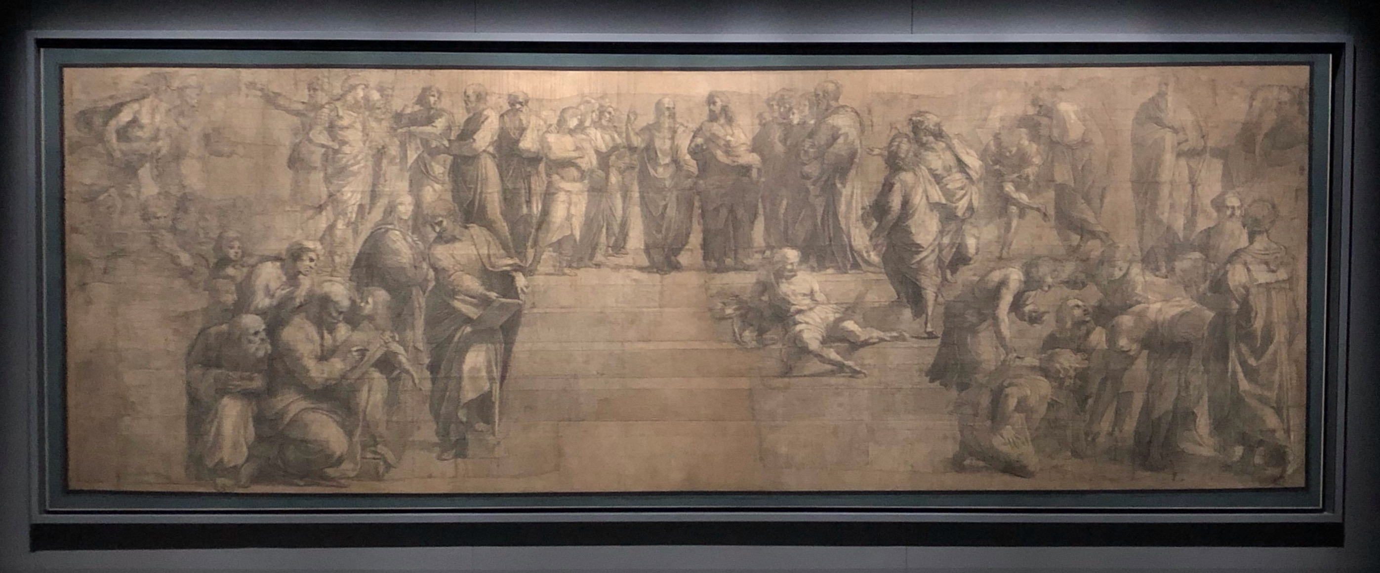 Carton préparatoire pour l'Ecole d'Athène de Raphaël conservé à la Pinacoteca Ambrosiana de Milan